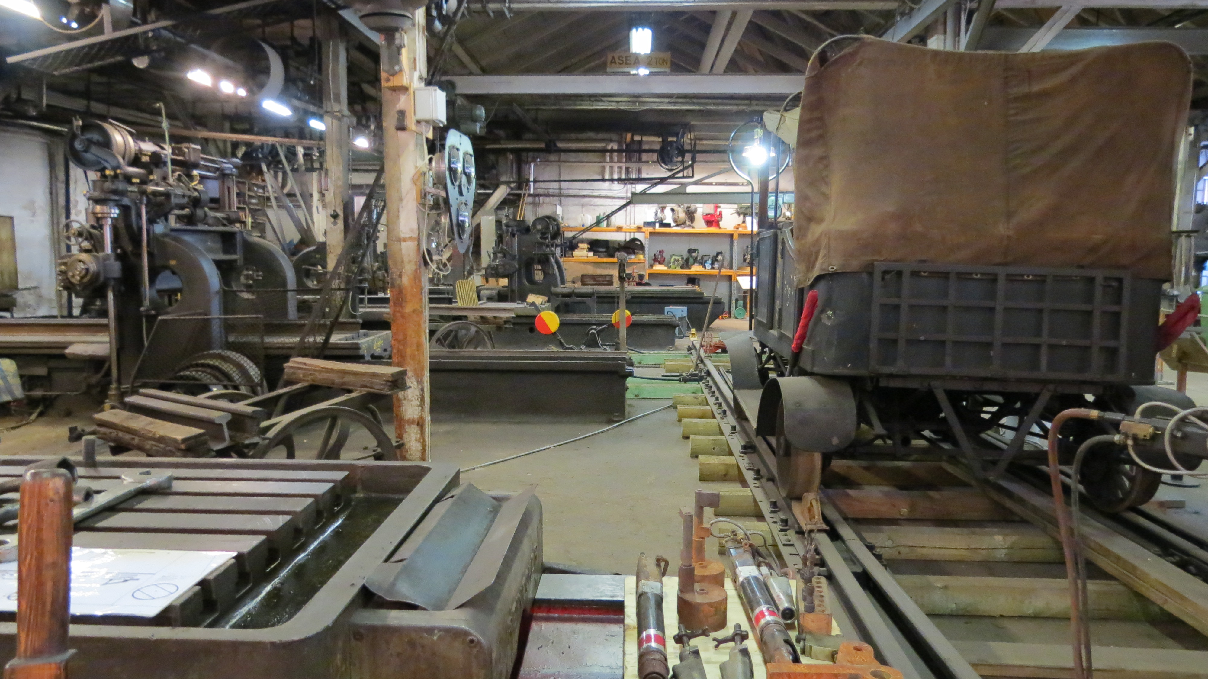 Verkstaden på Åssa-museet, Åtvidabergs bruks- och Facitmuseum. Åtvidaberg, Åtvidaberg